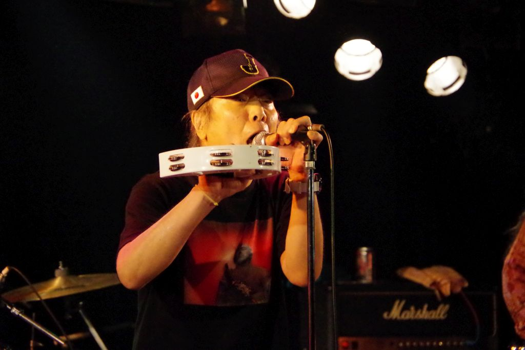 2017/04/14 ヨコハマライブ